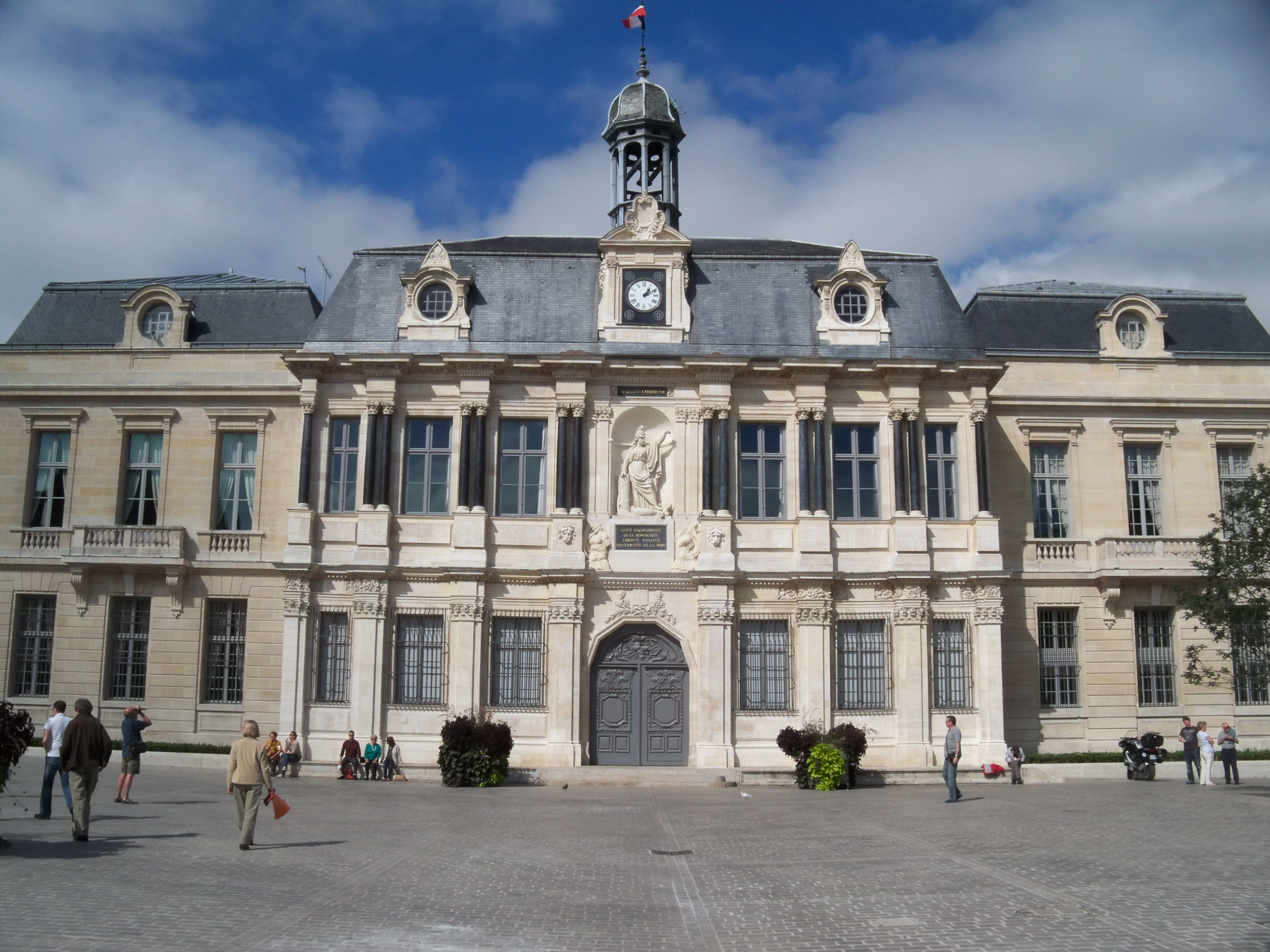 L'hôtel de ville de Troyes (Aube, France), classé depuis 1932 à l'inventaire des monuments historique et siège de la mairie de Troyes. .